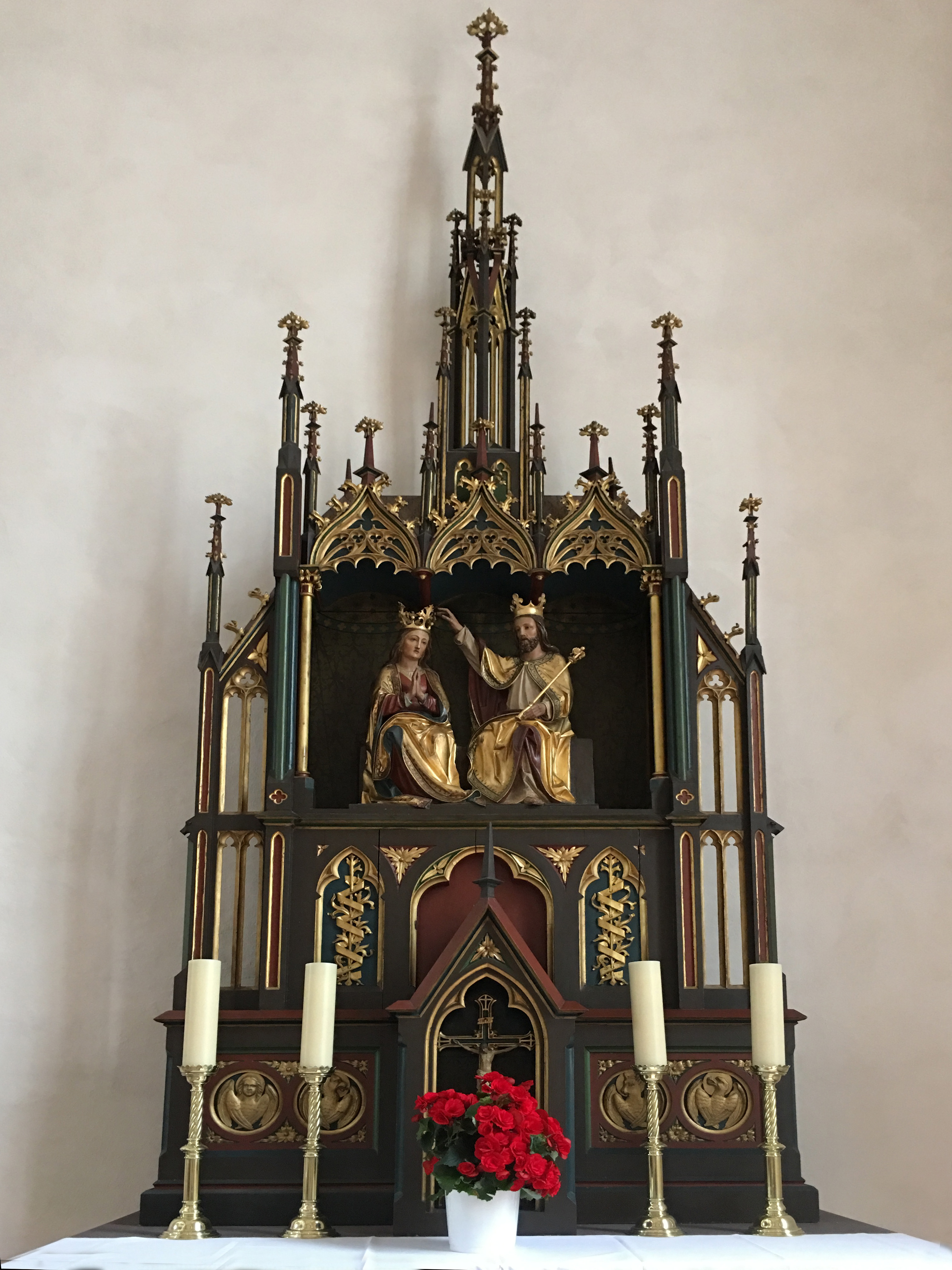 St. Georg in Bischofsheim an der Rhön - Neugotischer Seitenaltar - Marienkrönung